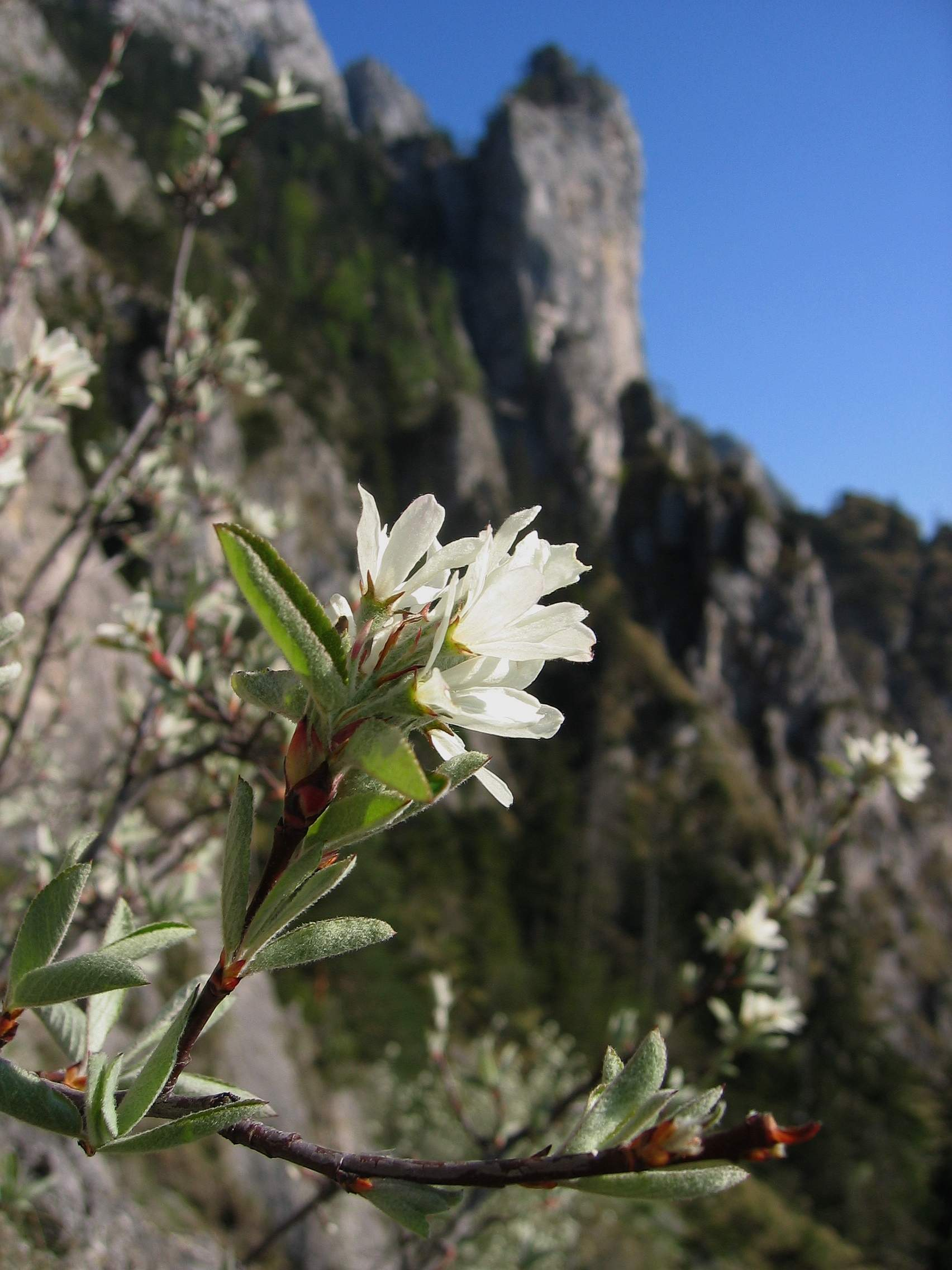 Amelanchier ovalis Traunstein, Upper Austria, Austria